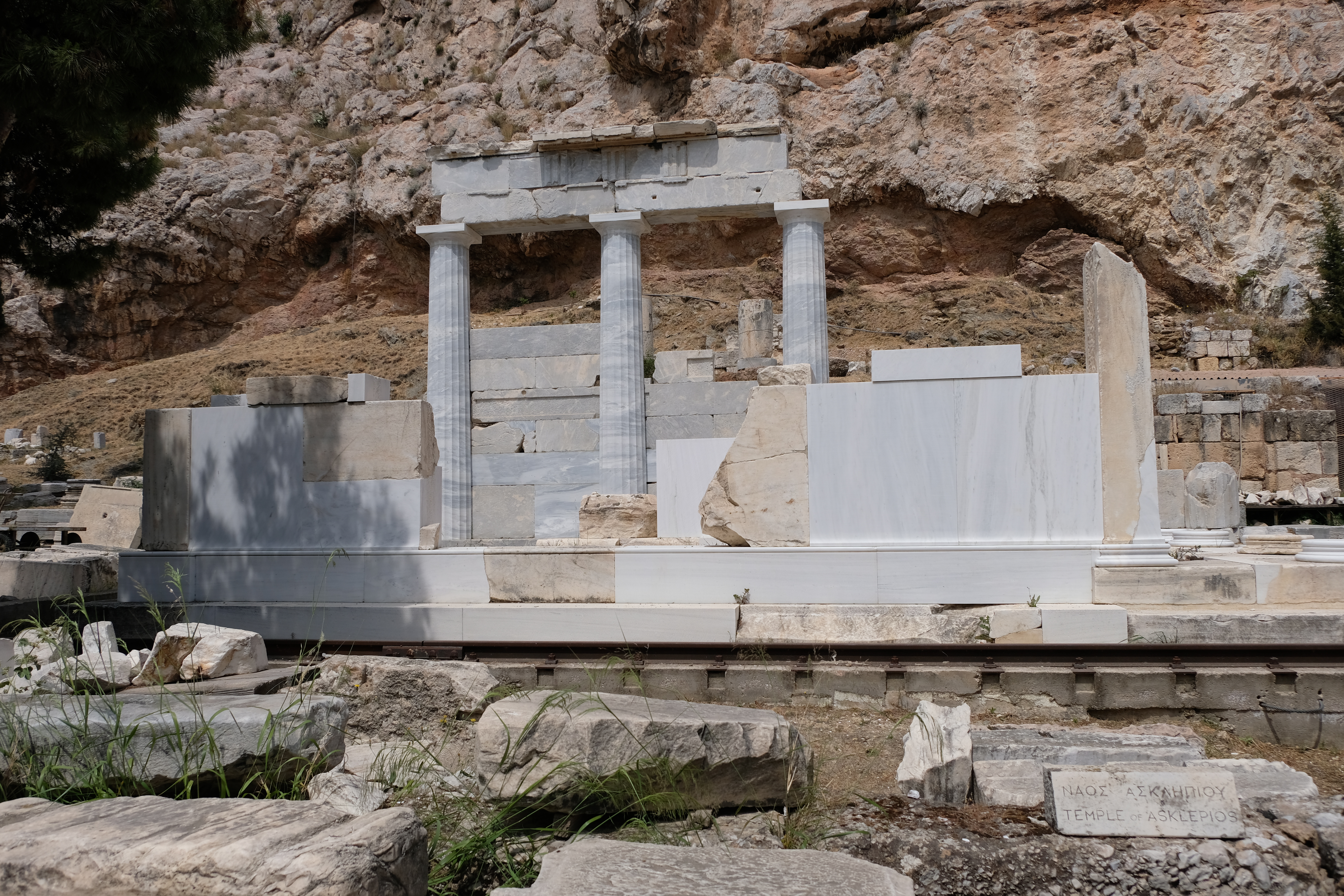 Asclepieion at 2018